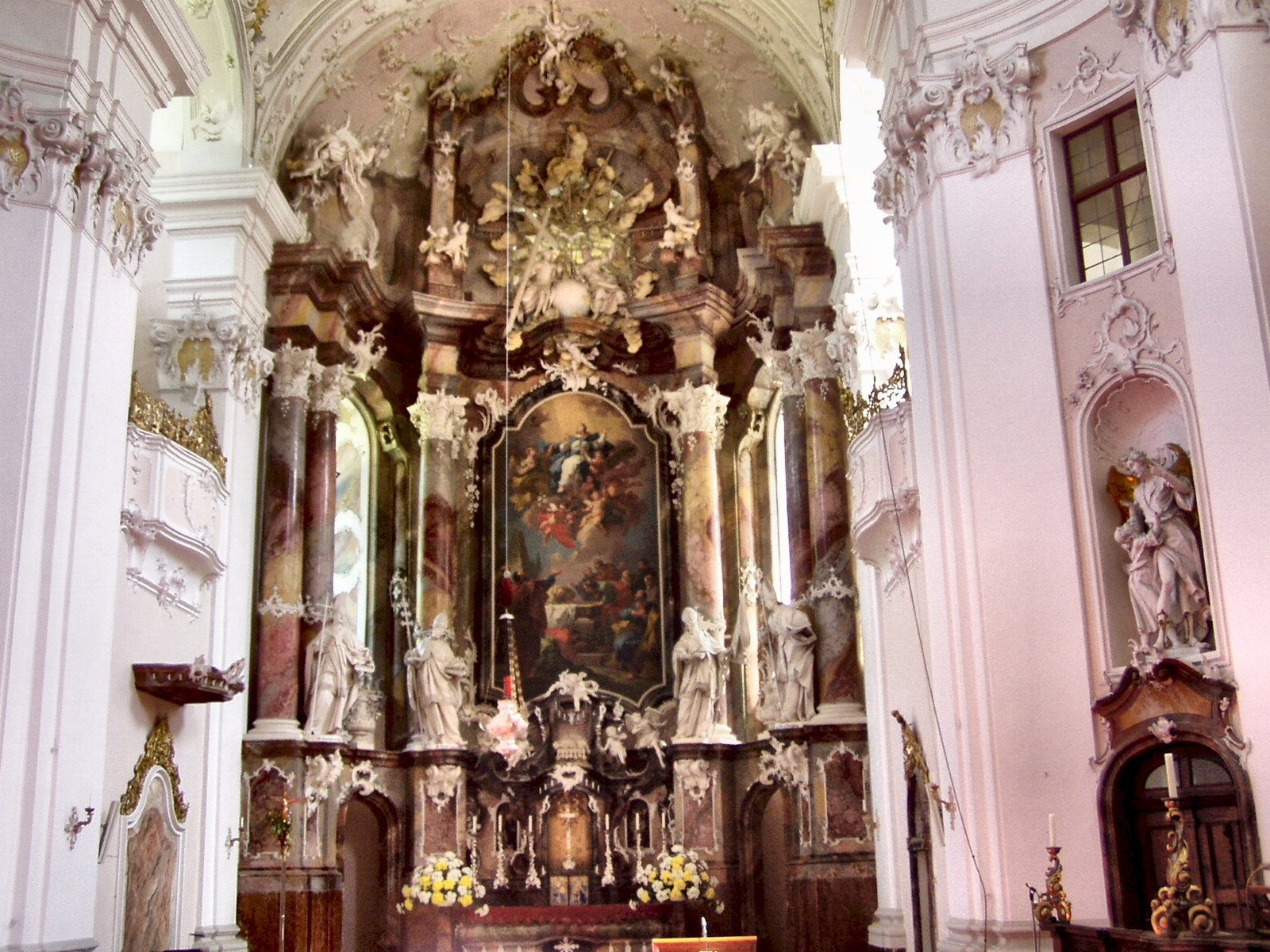 Stift Engelszell - Hochaltar